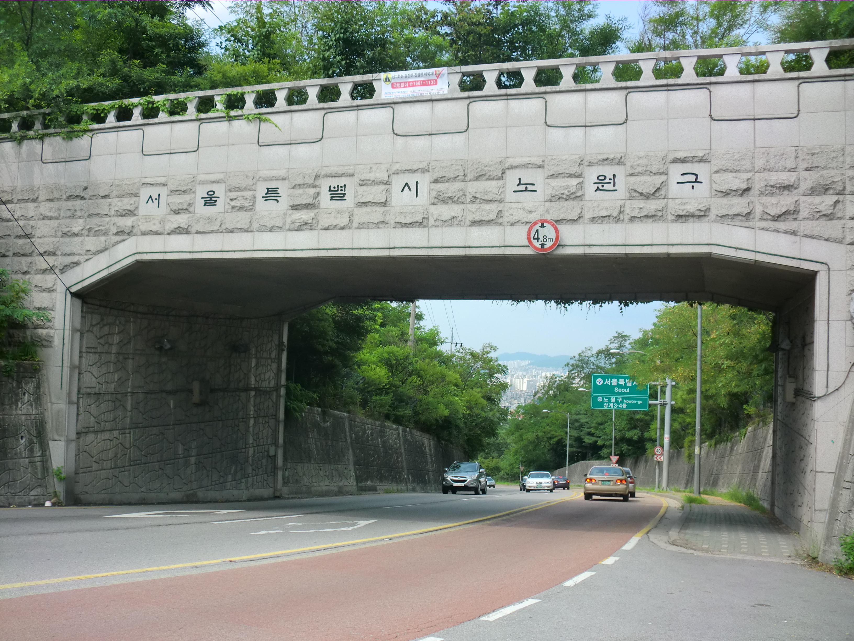 경기도 남양주시와 서울특별시 노원구의 경계